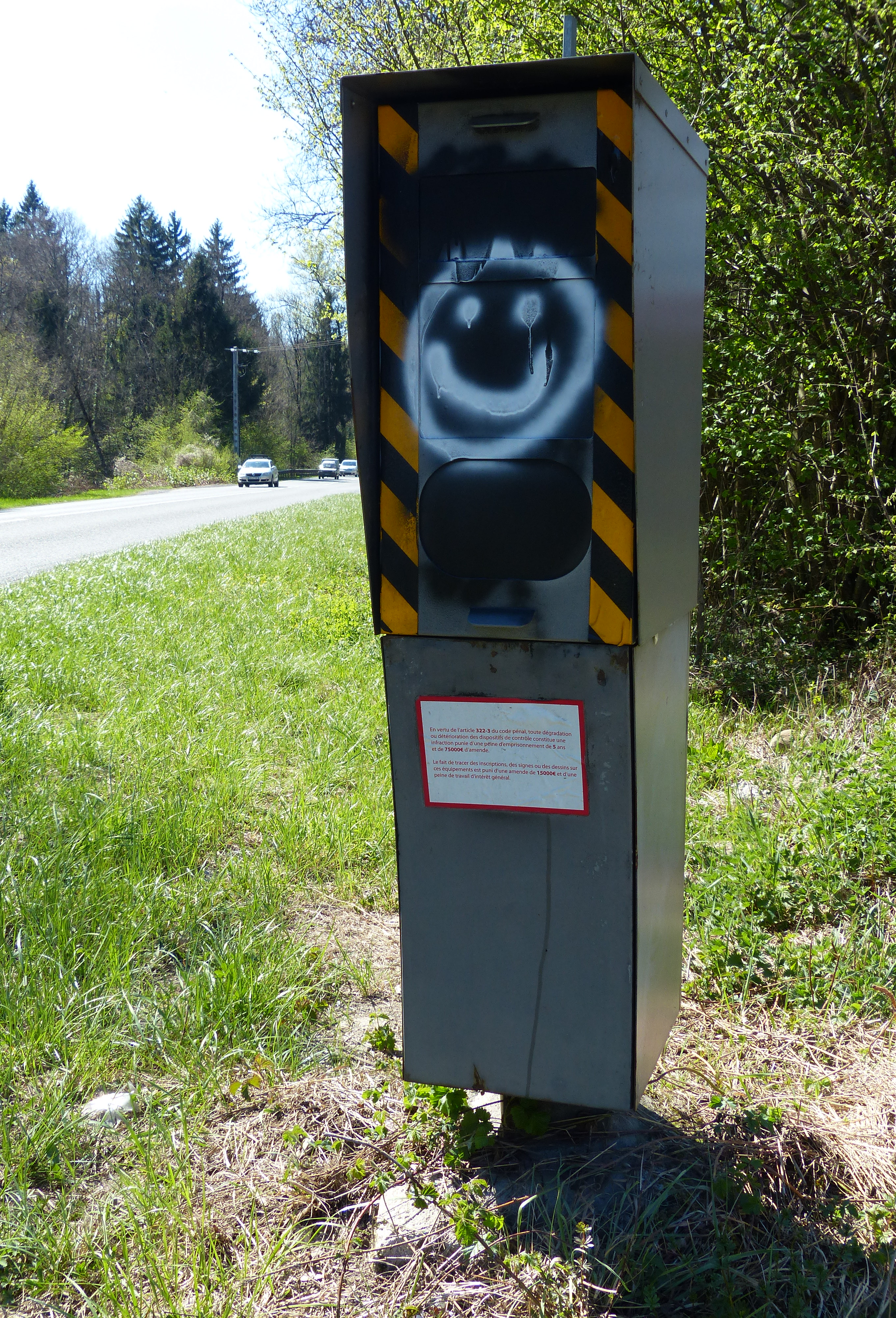 Radar vandalisé avec un smiley peint, D907, Fillinges, Haute-Savoie, France.